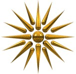 Ilios Verginas